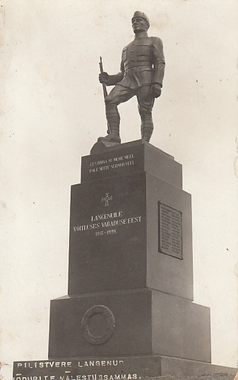 Monument to the War of Independence in Pilistvere